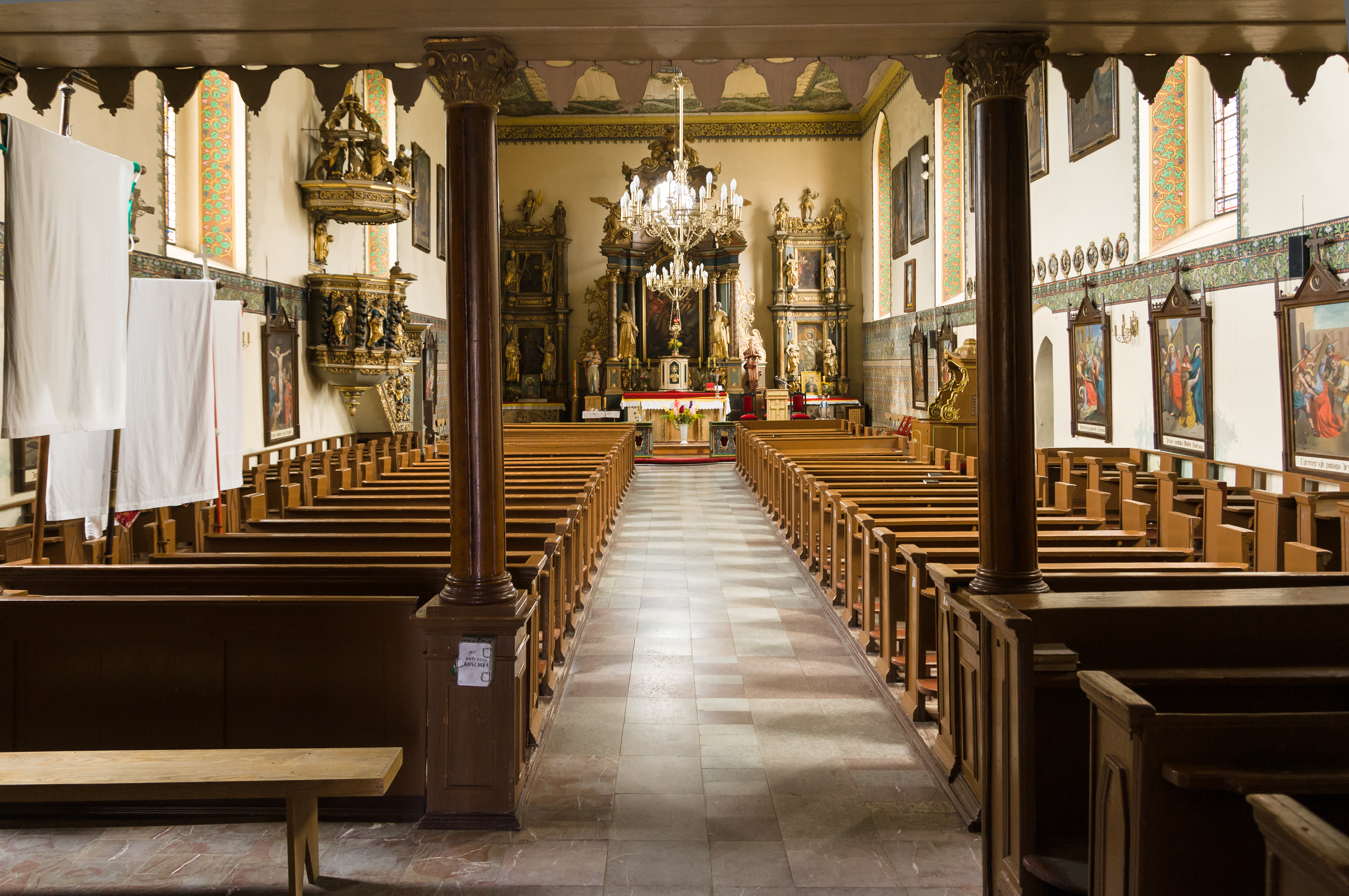 Kostel v obci Satopy, Polsko